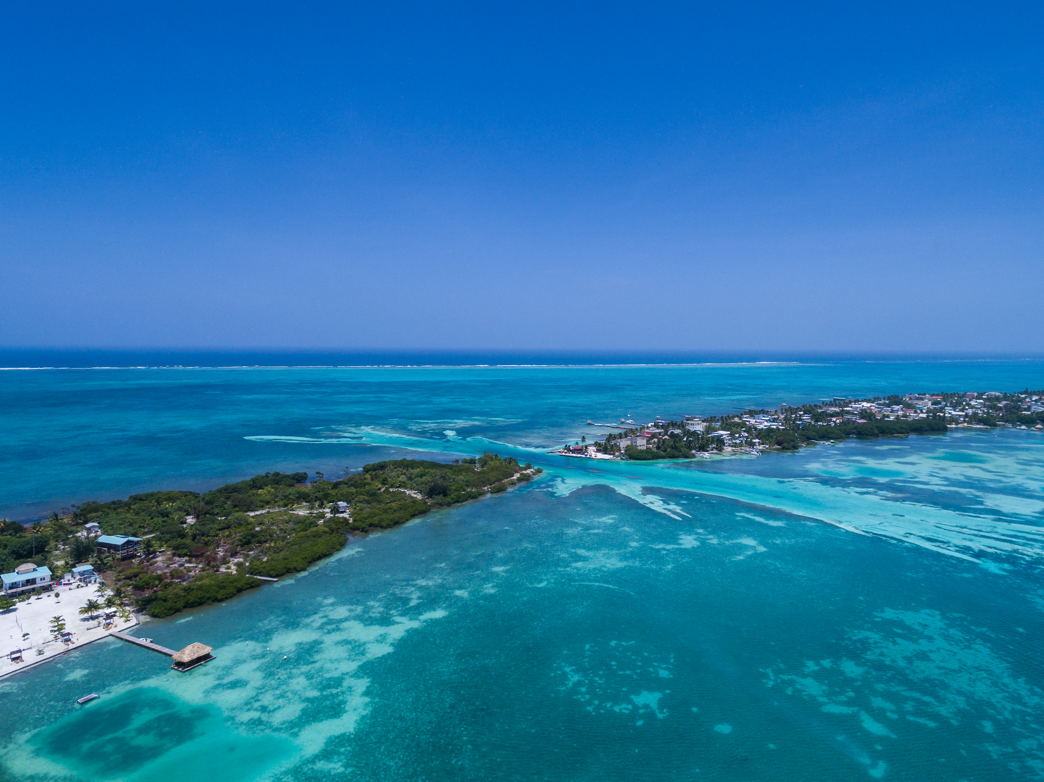 beautiful island in Belize, Caye Caulker